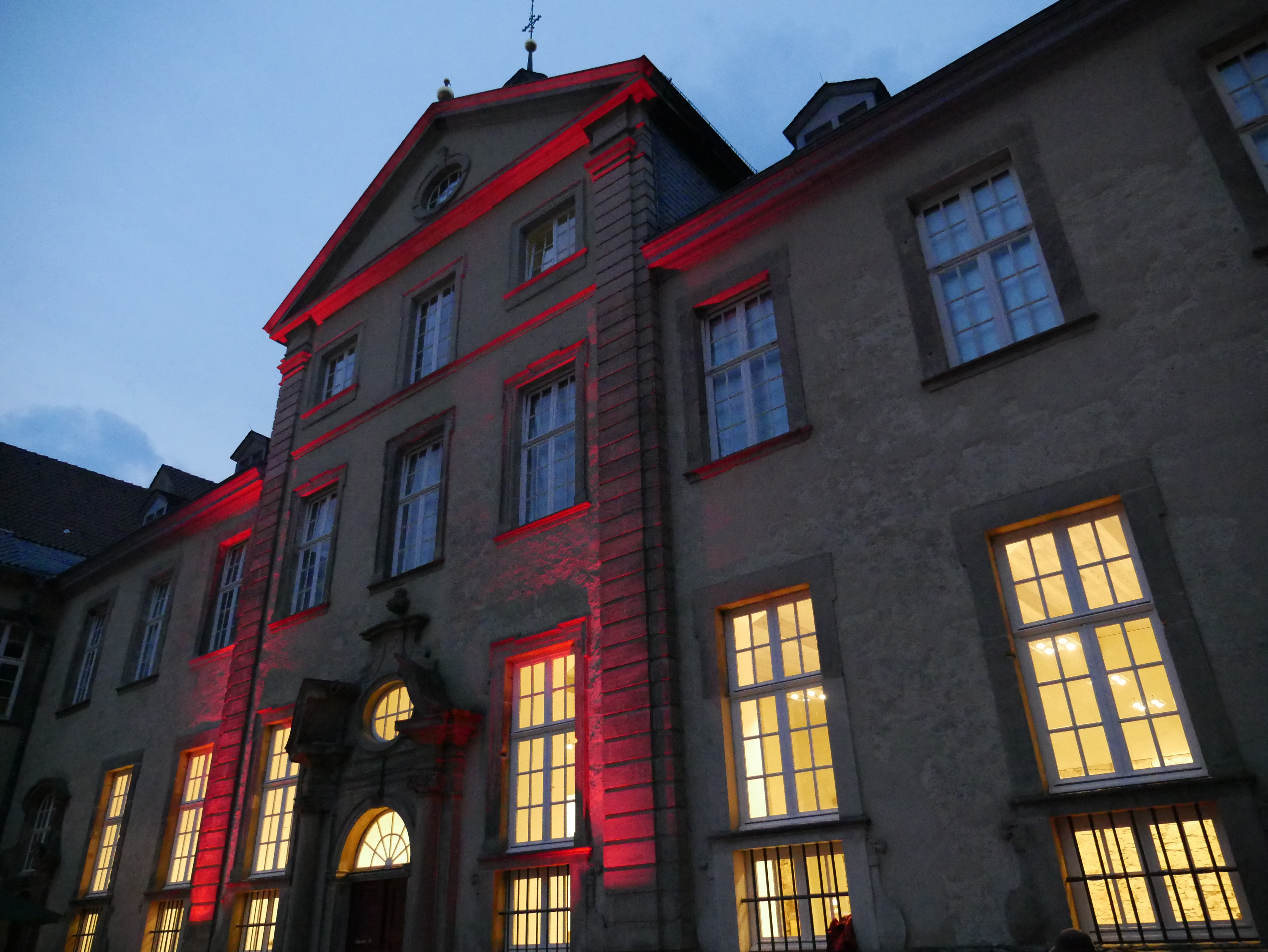 Der Ehrenhof schafft eine besondere Konzertatmosphäre.